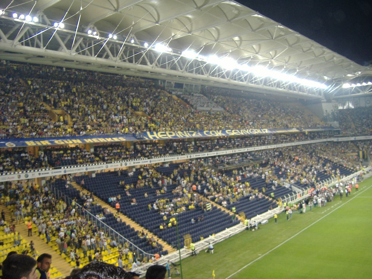 5 Ağu 2006 Fenerbahçe-K.Erciyes